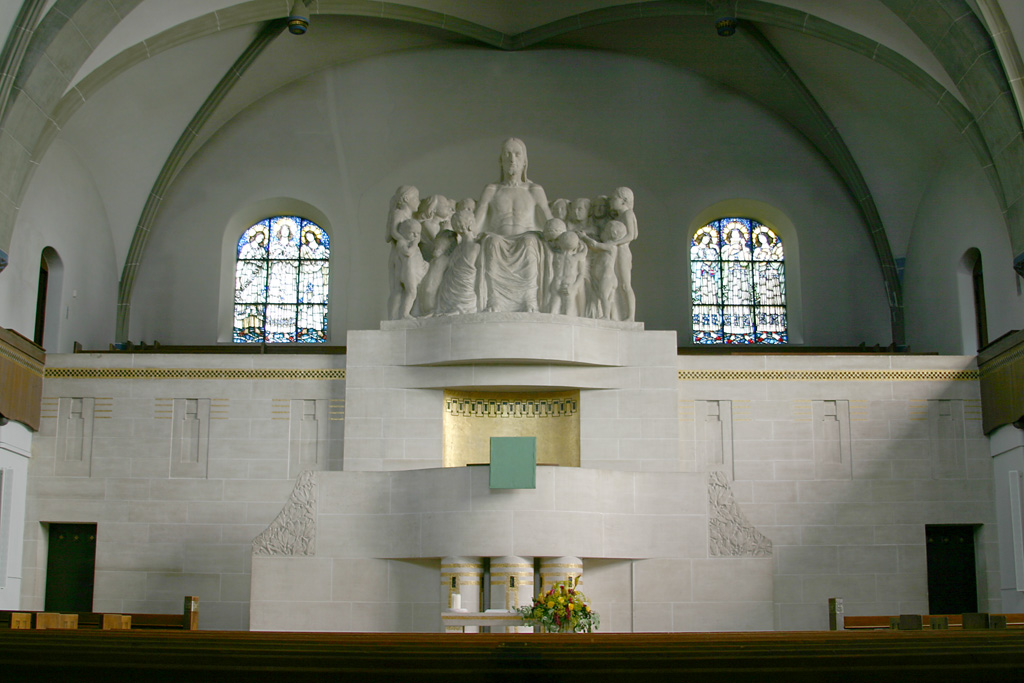 Pauluskirche, Bern, Schweiz